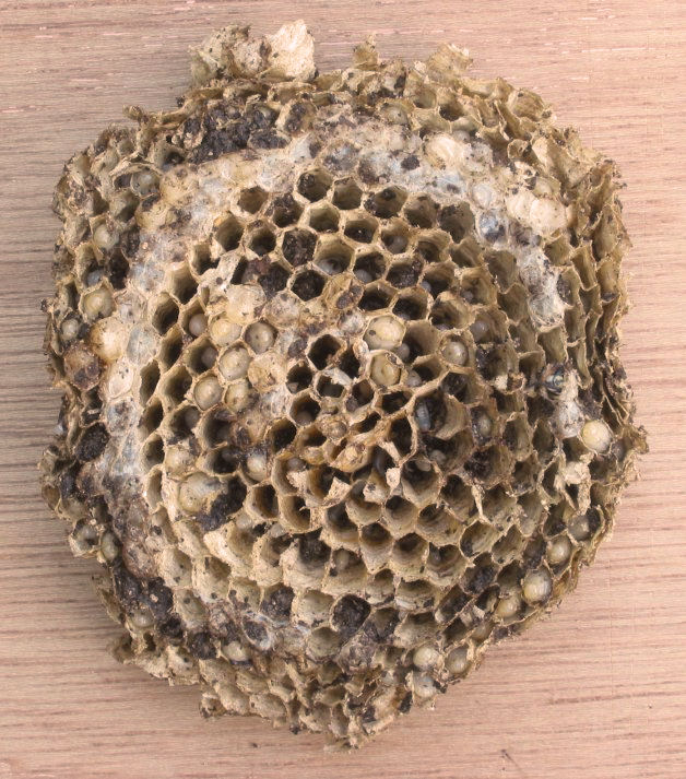 zelfgemaakte foto van wespennest dwarsdoorsnede; eind juli. Het nest is wat vervuild met grond.